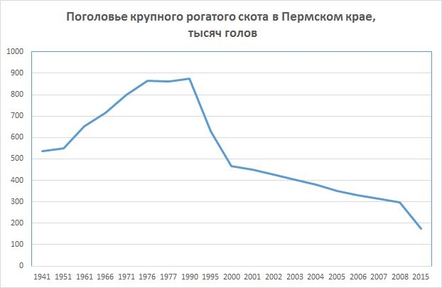 Поголовье крупного рогатого скота в Пермском крае